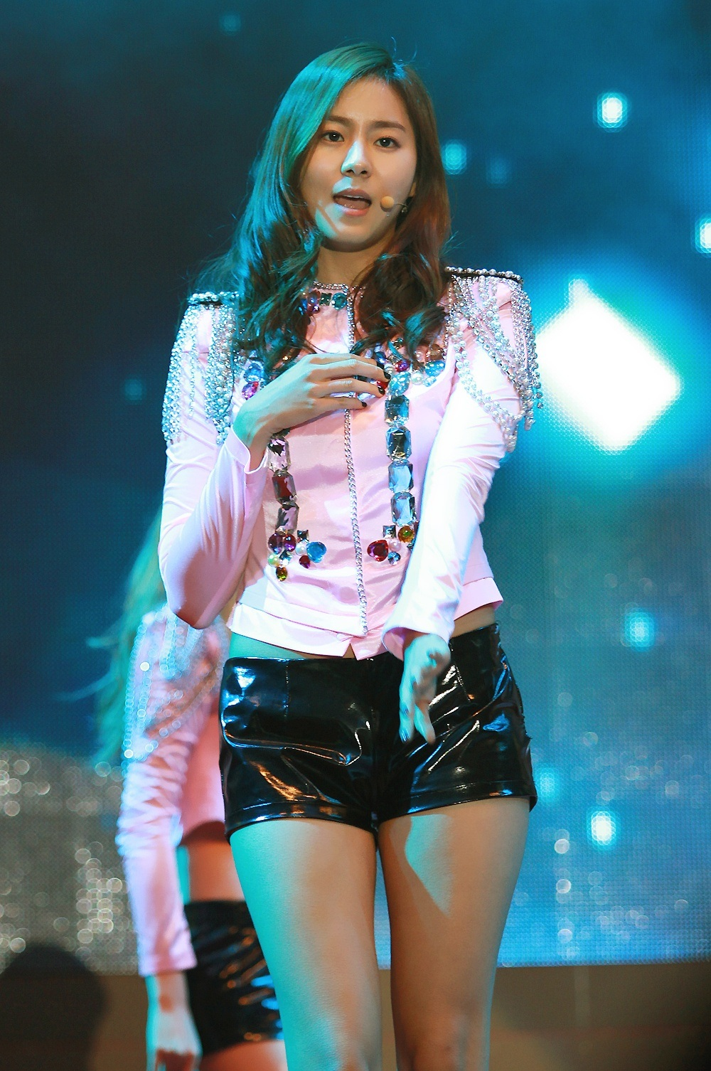 101217 롯데월드 프리크리스마스-애프터스쿨